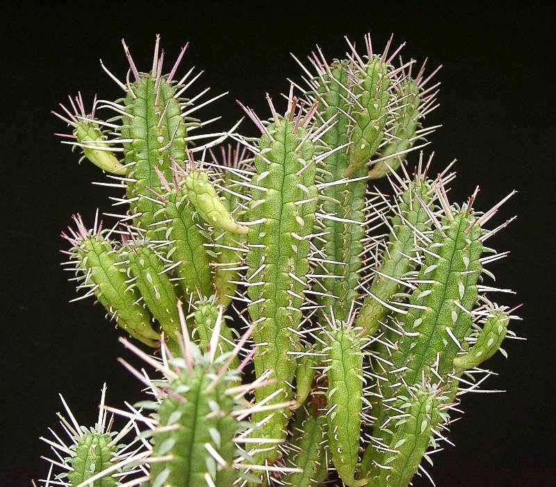 Euphorbia submammillaris